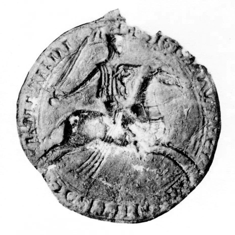 Verzameling Nederlandse zegels van voor 1300